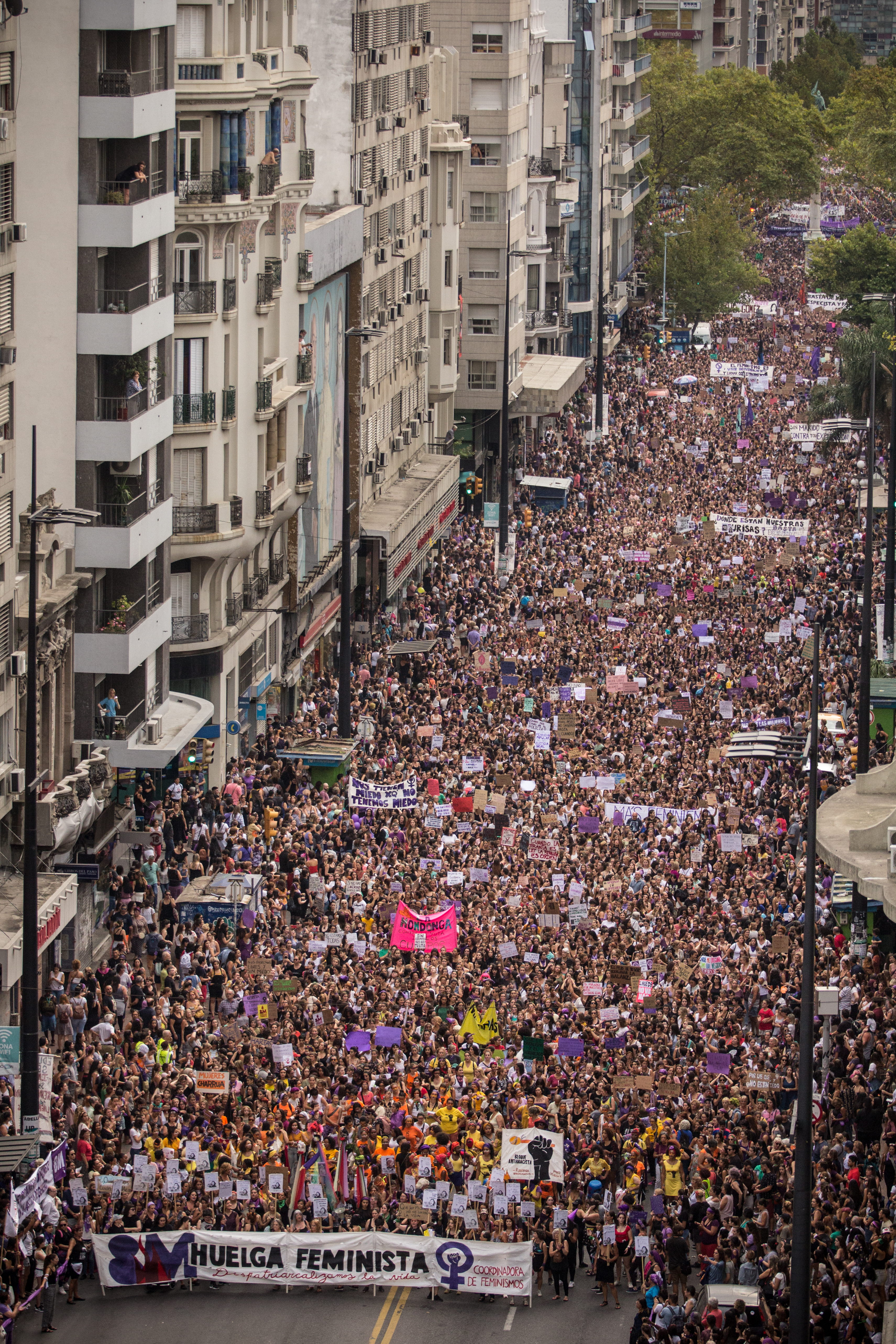 Panorámica Marcha #8M2020 Montevideo - Paro Internacional de Mujeres 2020 en Uruguay - Cobertura Colaborativa